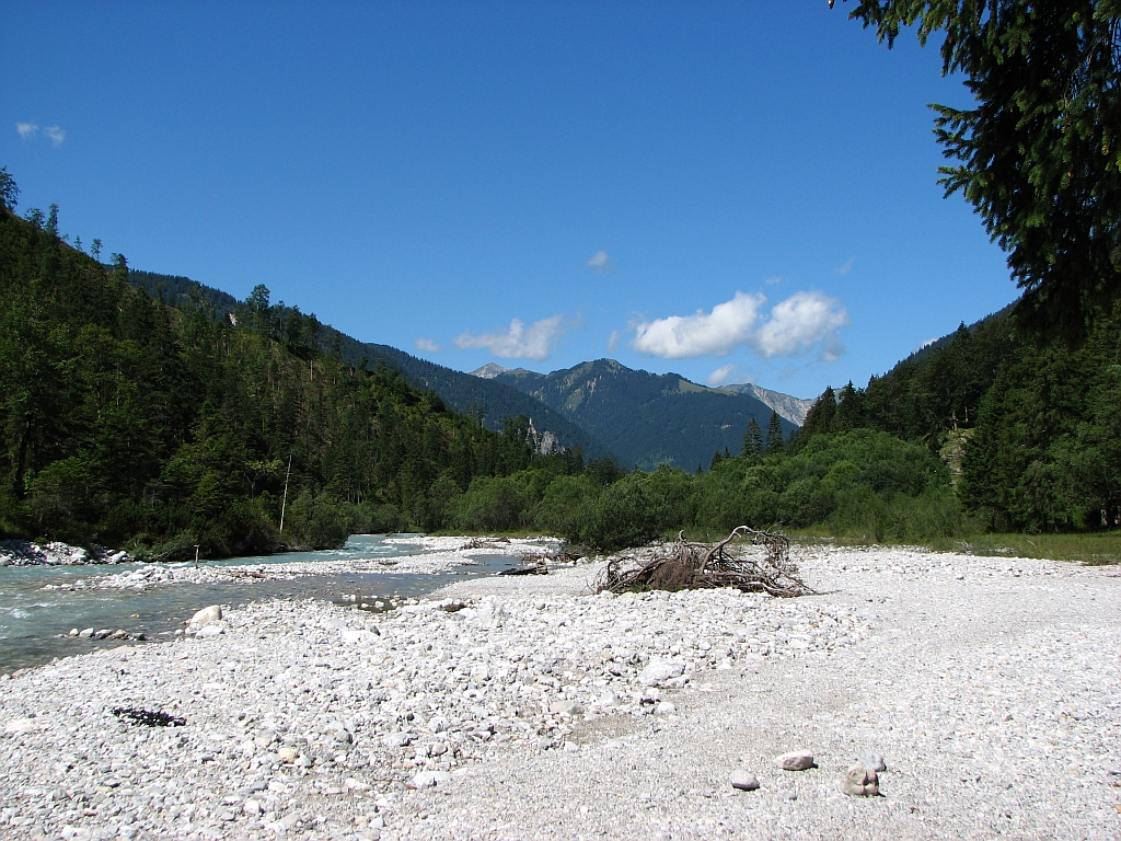 Der Rißbach im Rißtal im Karwendel